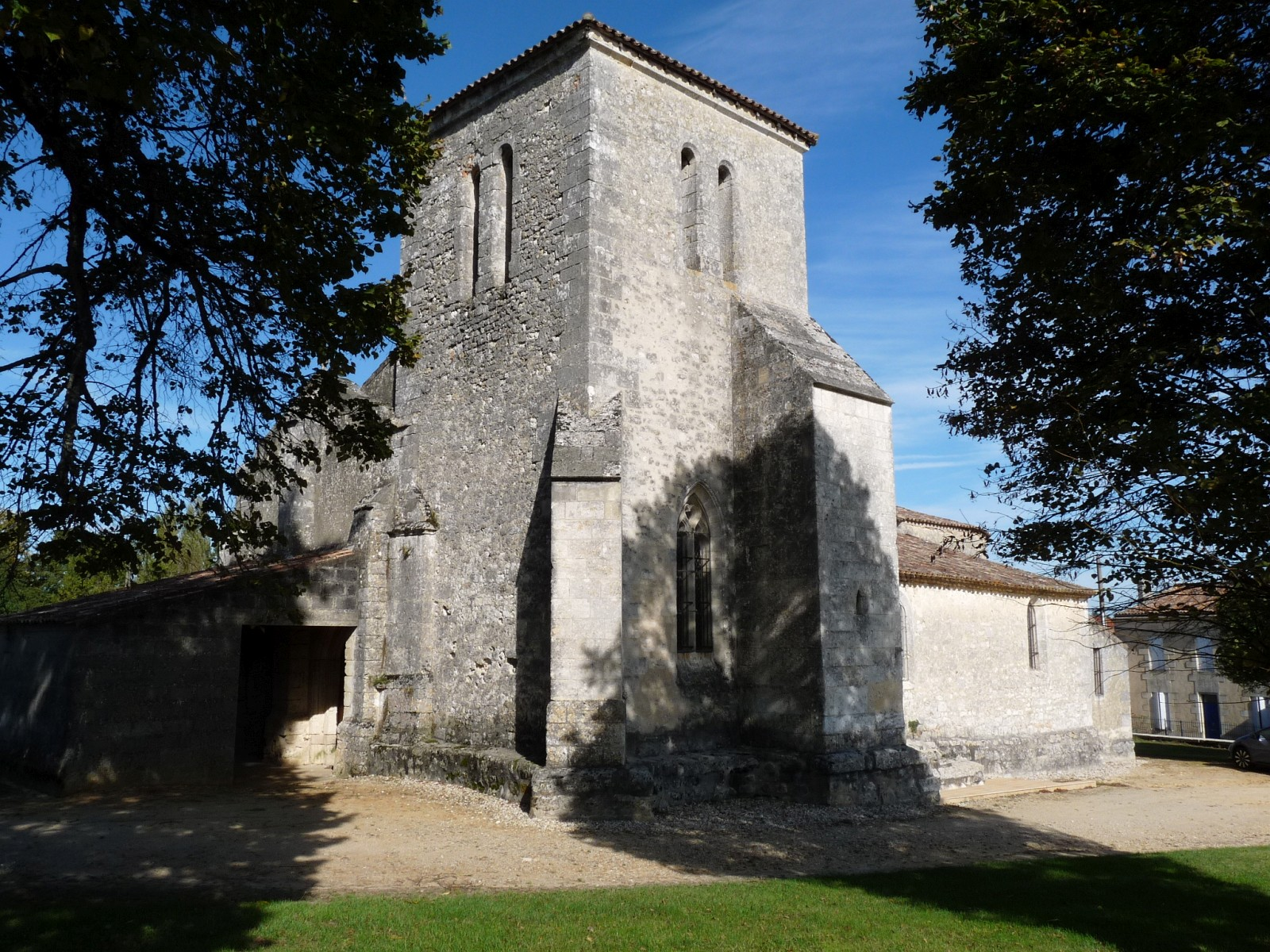 Eglise de Teuillac, Gironde, France